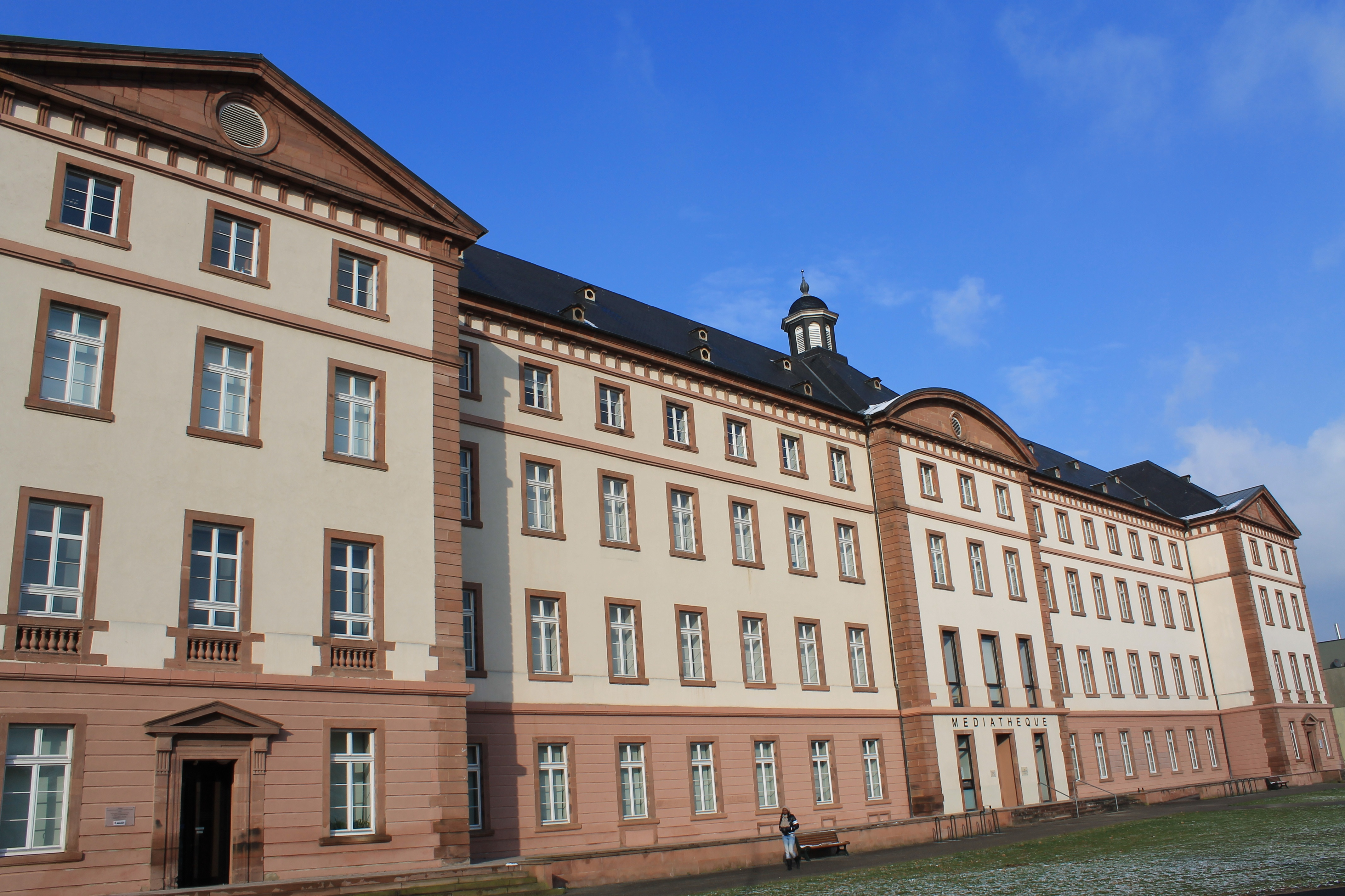 Bâtiment historique au 24 rue du Maire-André-Traband abritant la médiathèque ainsi qu'une partie de l'IUT de Haguenau.